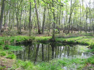 Zelfgenomen afbeelding, poel in asbroek